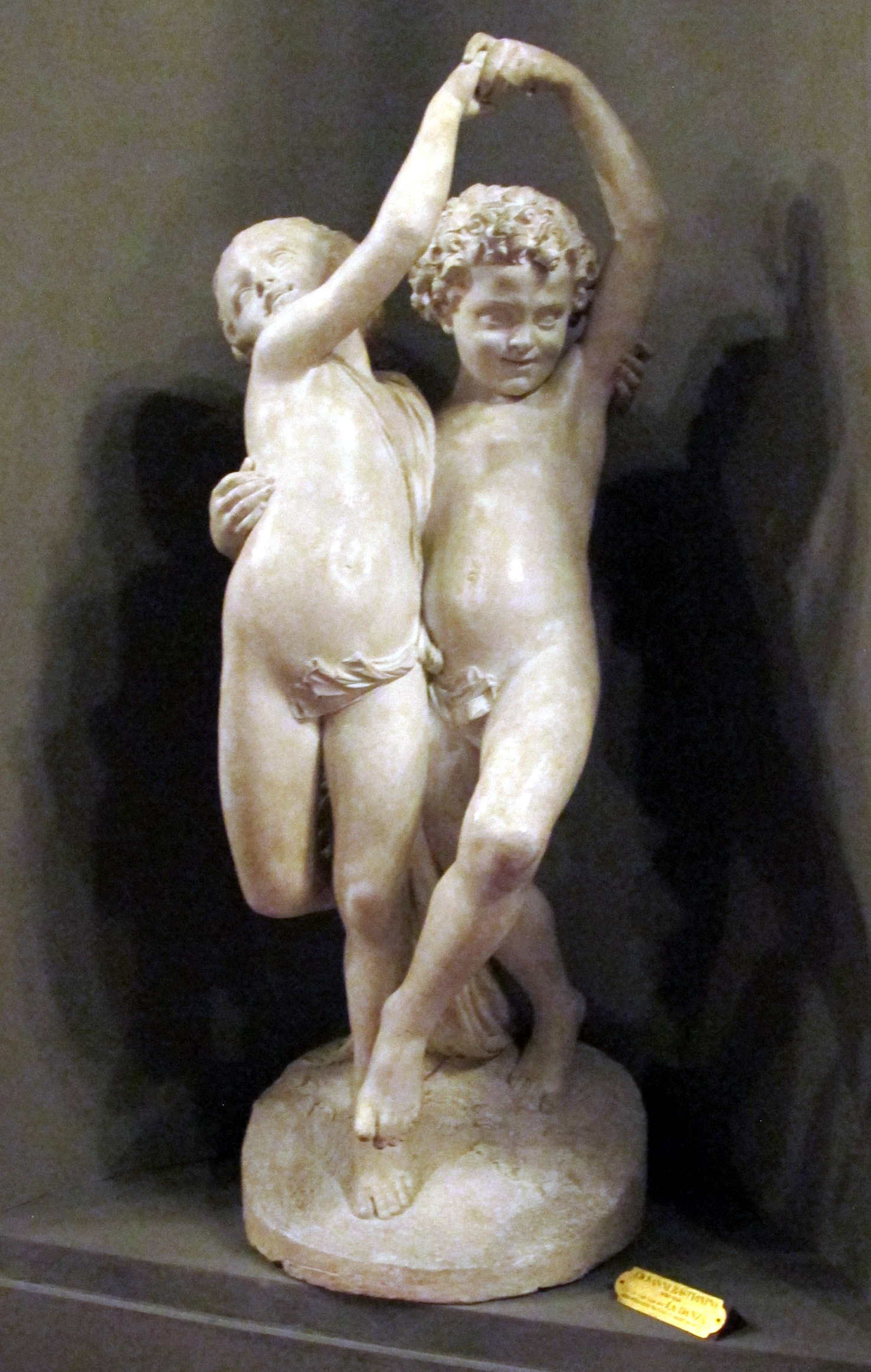 Palazzo pitti, scalone del poccianti, giovanni bastianini, la danza